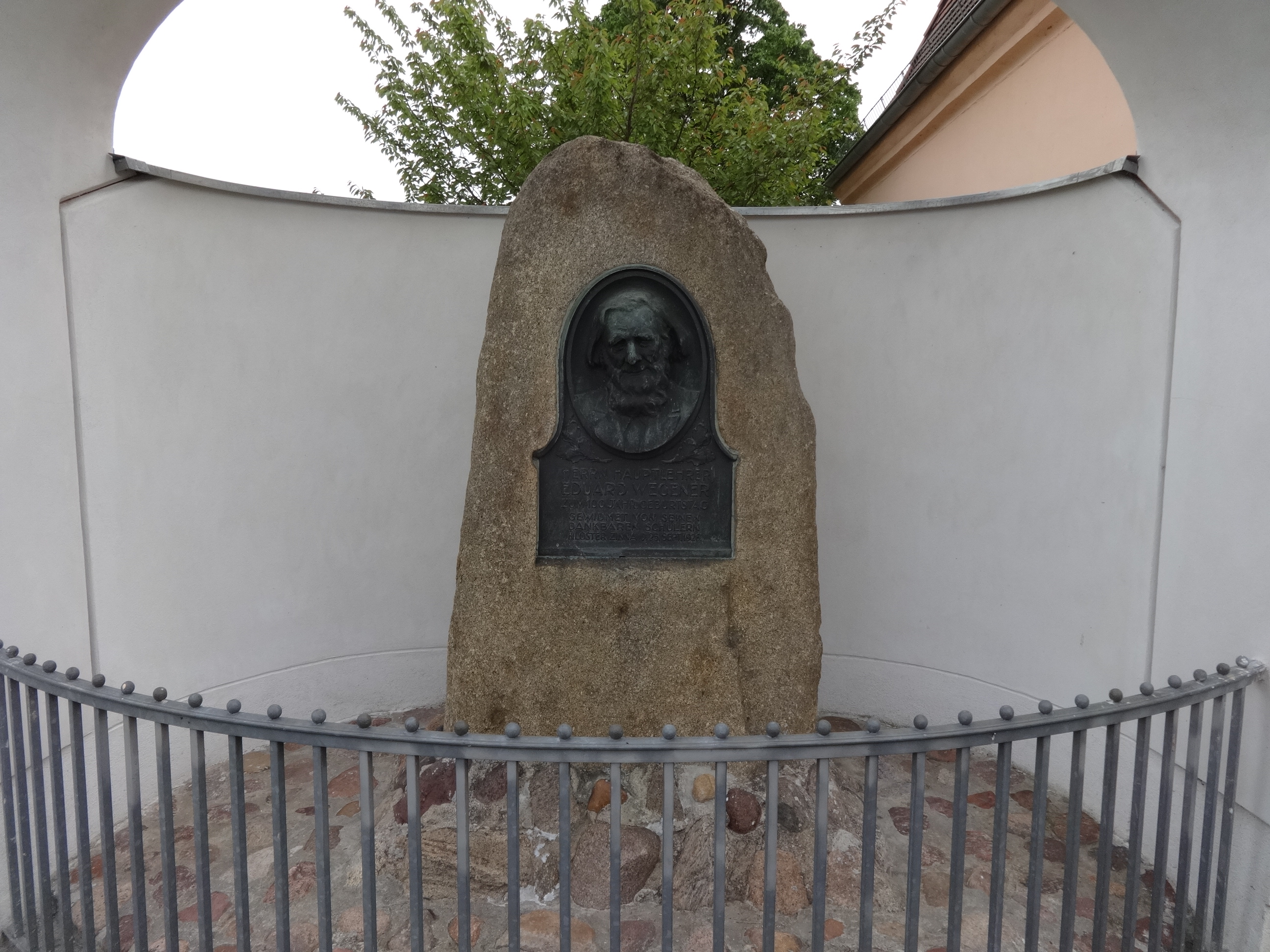 Die Manufaktur der Weberkolonie entstand als Fabrikantenhaus für Weber im Jahr 1776. Im 19. und 20. Jahrhundert wurde es als Schule und Jugendheim genutzt. Im 21. Jahrhundert befindet sich in dem Bauwerk ein Weberei-Museum sowie ein Restaurant.